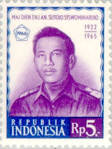 Sutoyo Siswomiharjo